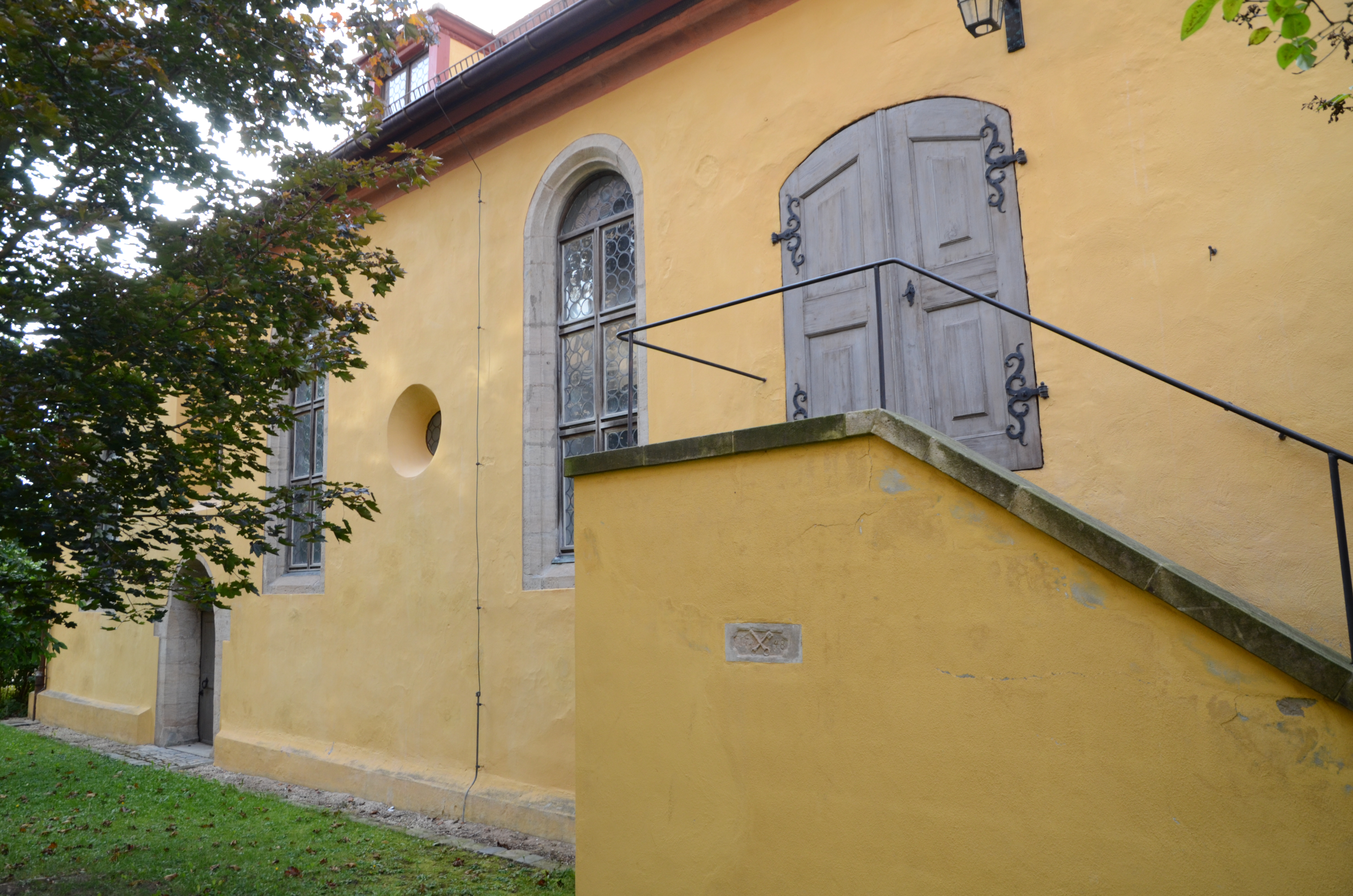 Dinkelsbühl Dr. Martin Luther Straße 8